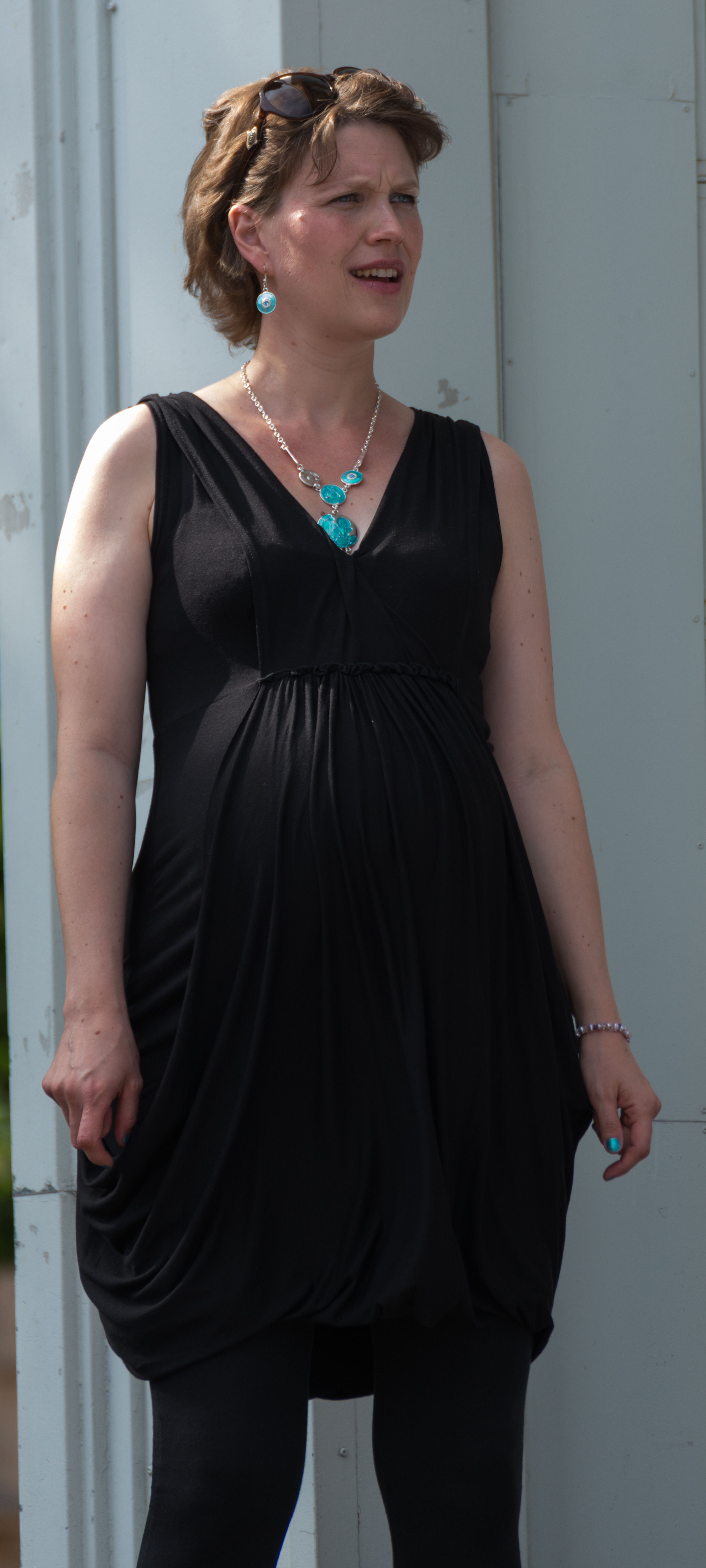 Jenny robson suomalainen laulaja